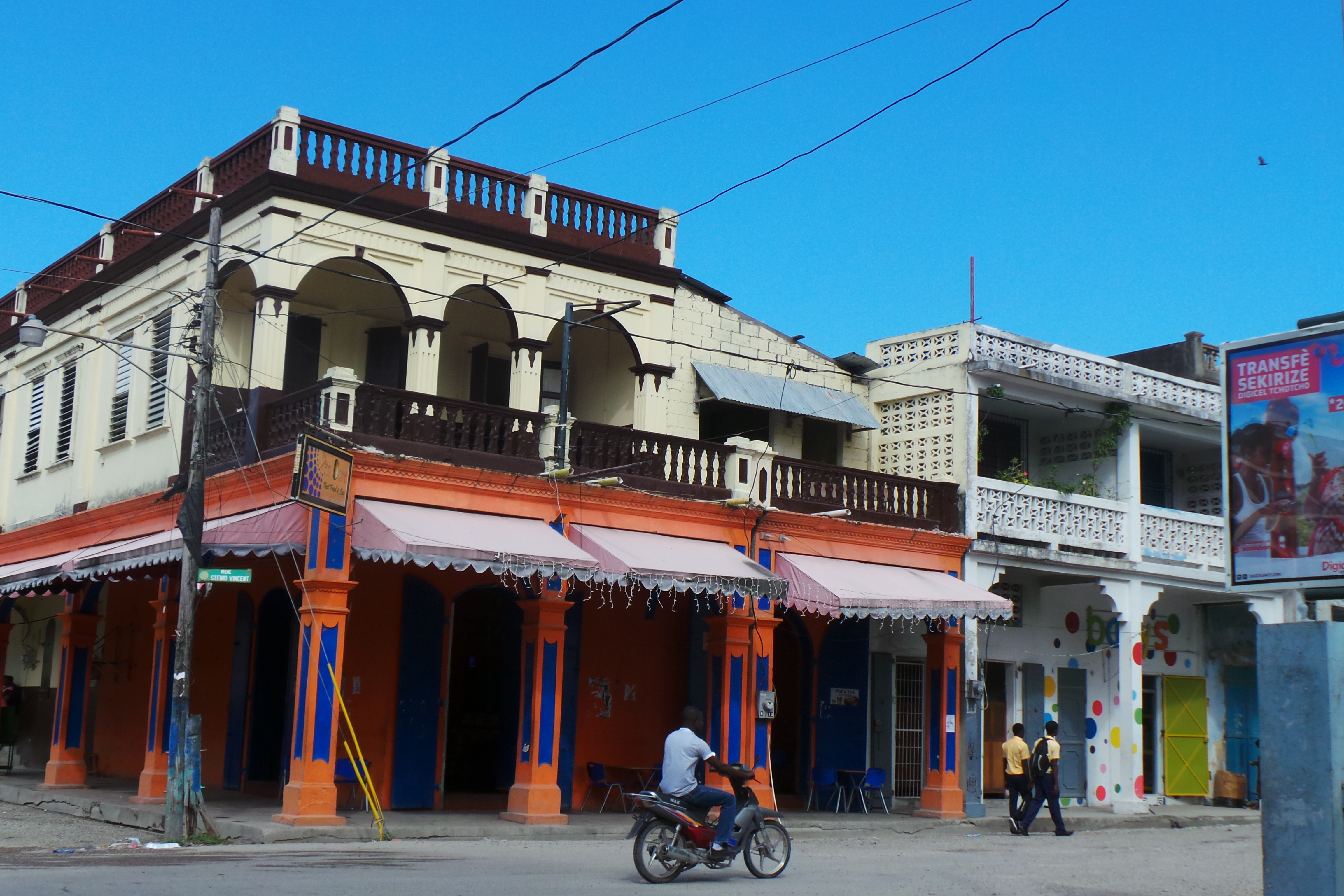 ajout d’images sur Haïti